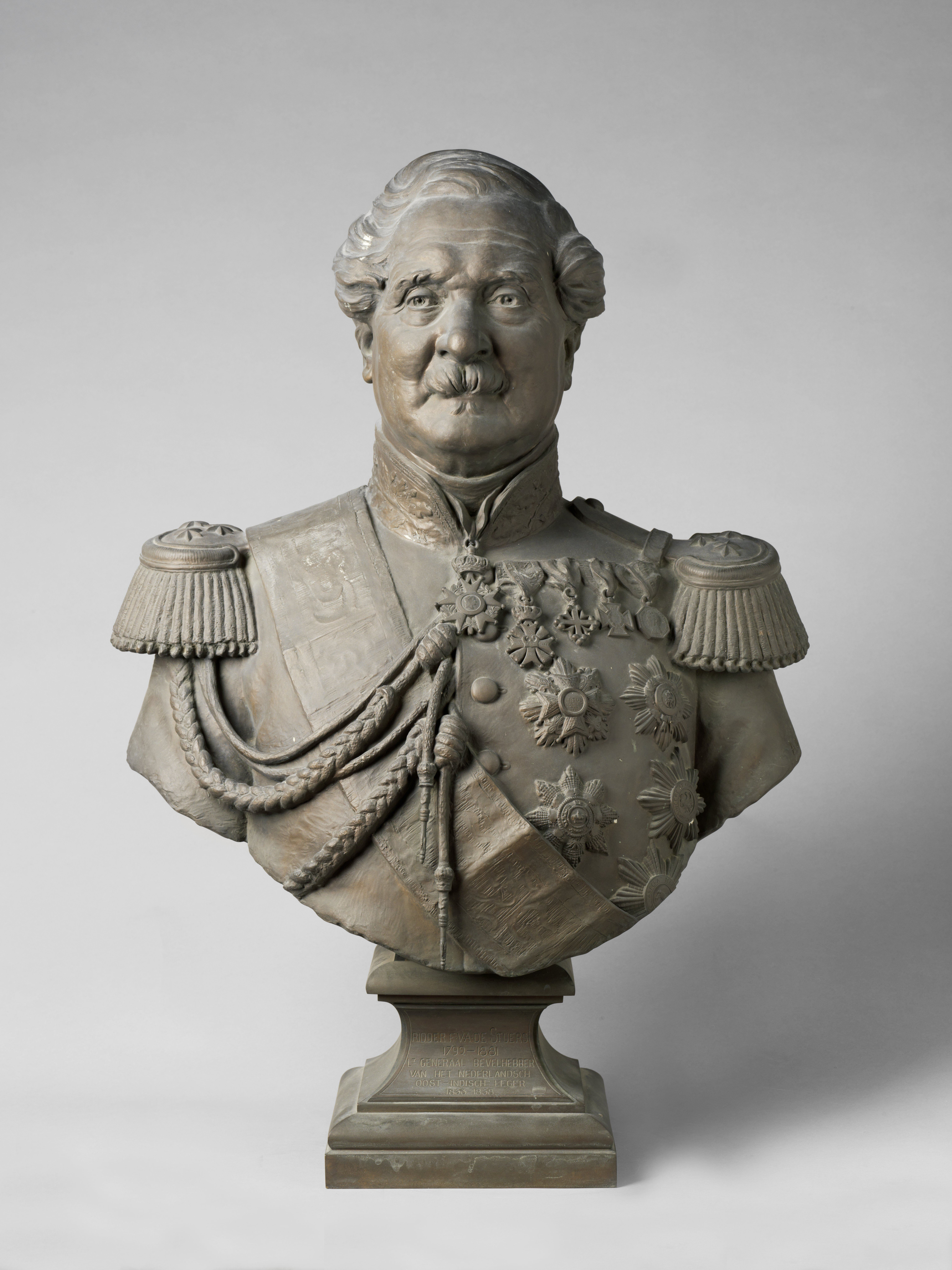 Levensgroot borstbeeld in brons van Ridder Francois V.A. de Stuers (1799-1881). Gemerkt ter zijde onder de linkerschouder: A de Stuers fcit 1902. In 1903 door Alphonse en Victor de Stuers geschonken aan het Rijksmuseum.